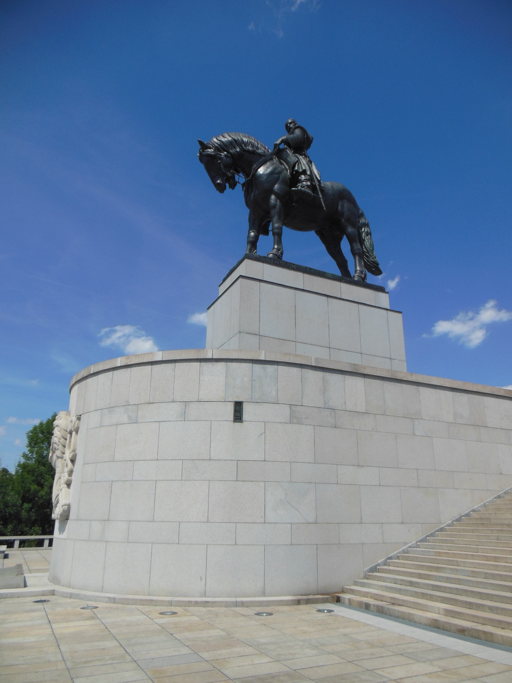 Praha-Žižkov. Národní památník na Vítkově, socha Jana Žižky.